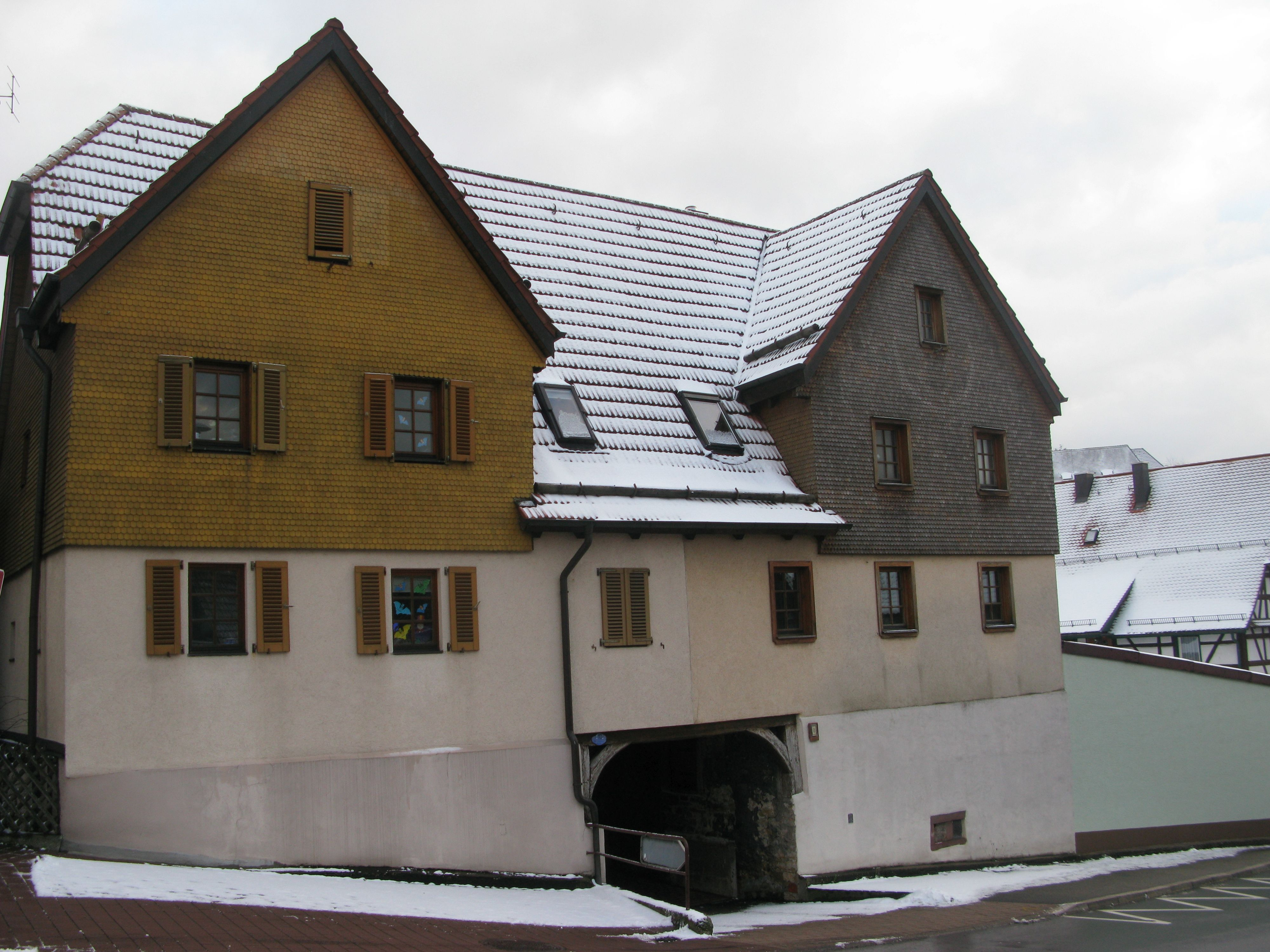 Ersingen Alte Kelter Denkmalgeschützt